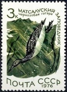 Почтовая марка СССР. 1976. Заповедники СССР. Матсалуский заповедник. Чернозобая гагара. Номер в каталоге ЦФА 4612